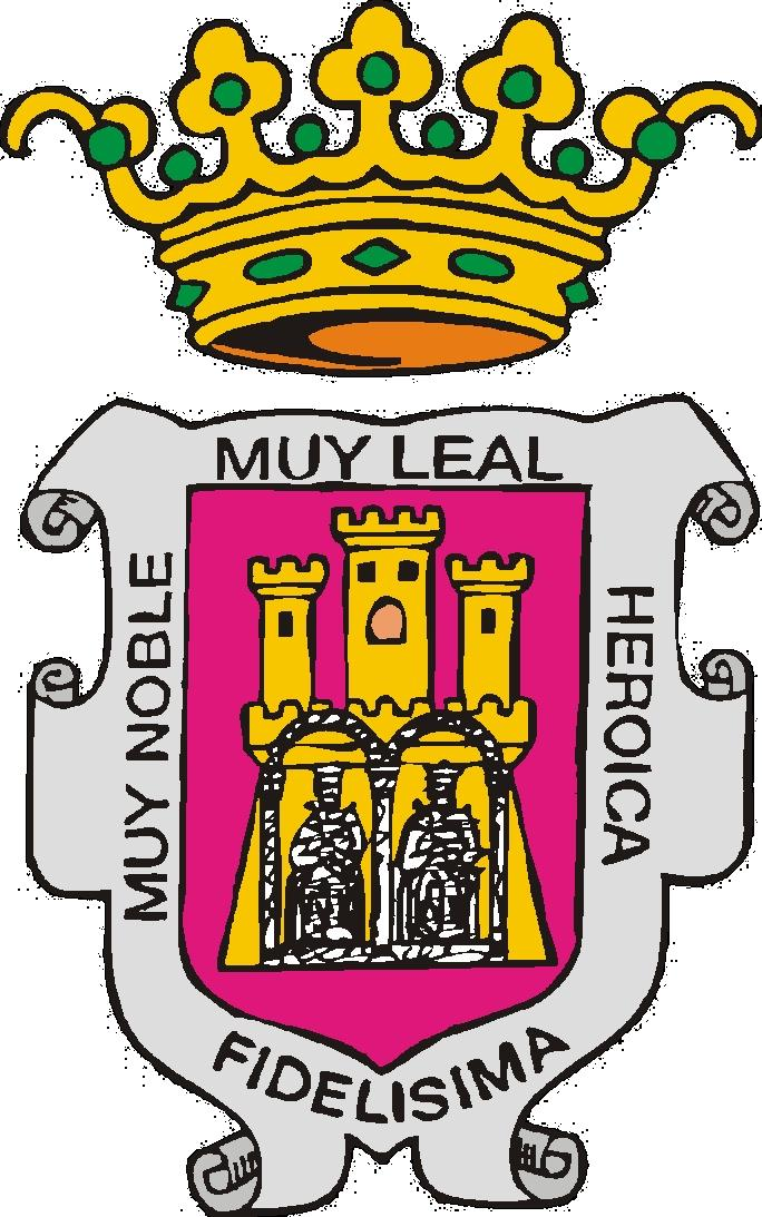 Escudo del municipio de Villarcayo de Merindad de Castilla la Vieja (Burgos).